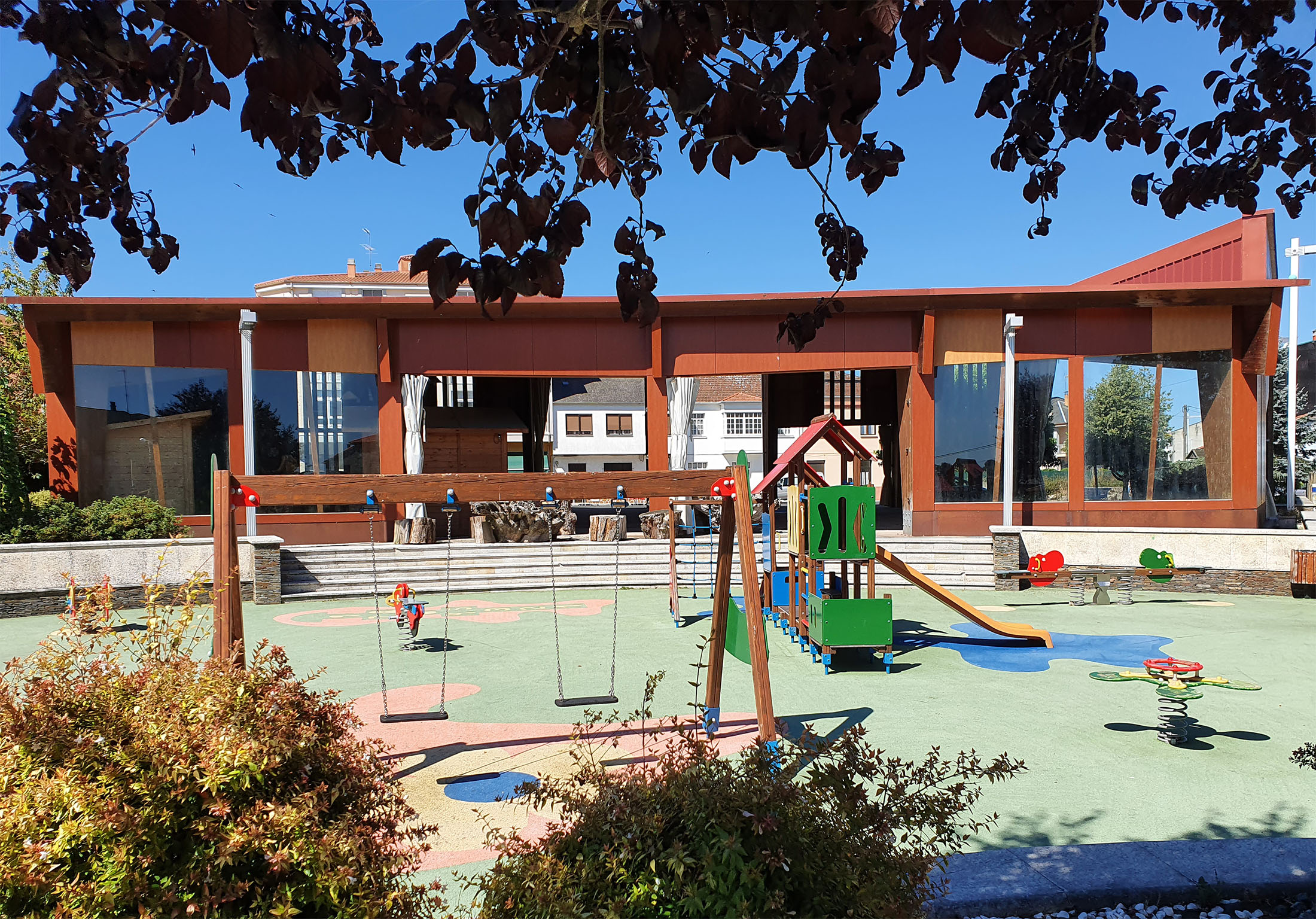 Vista do parque infantil de Antas de Ulla, coa Praza Nova ao fondo.